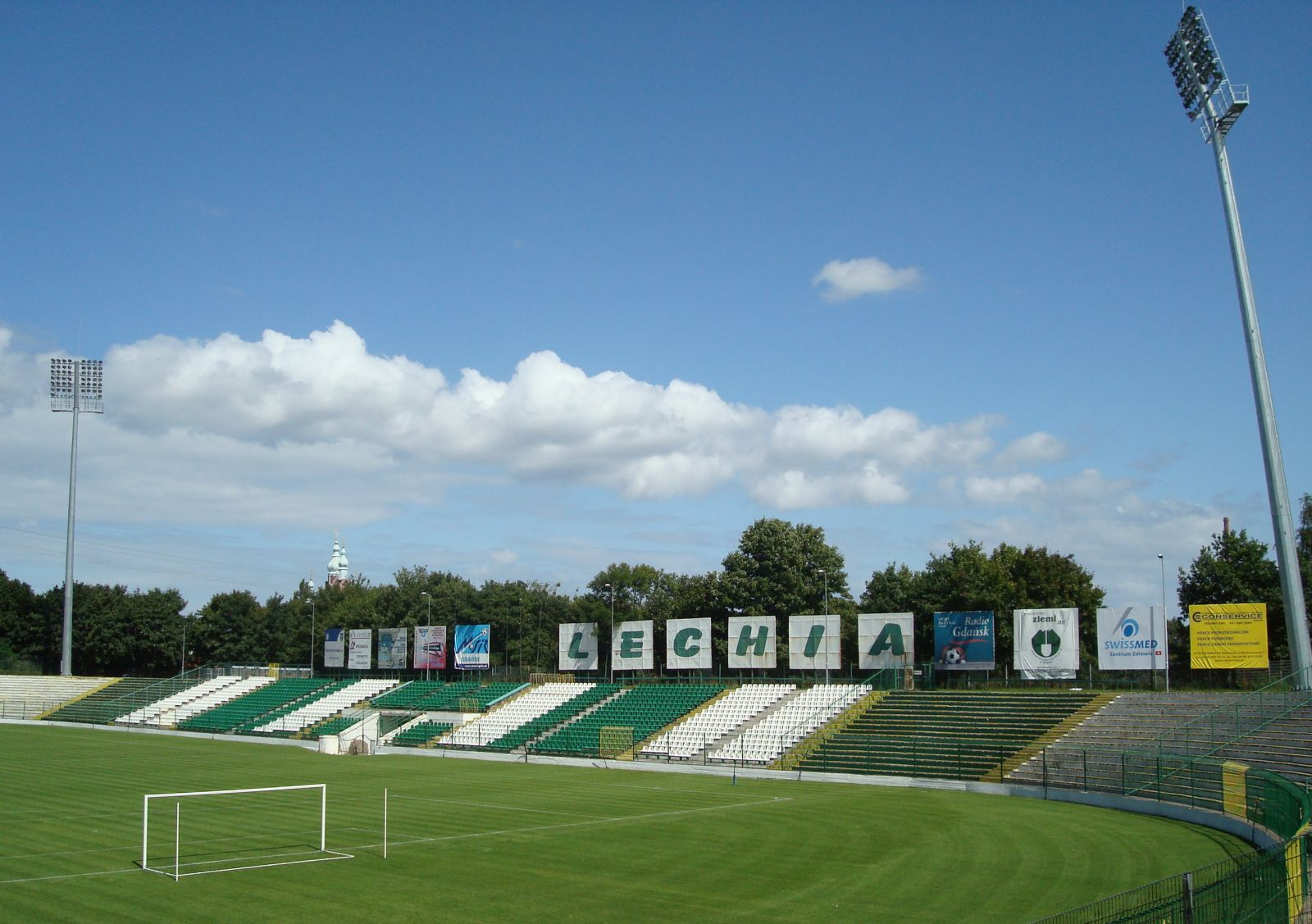 Stadion Lechii Gdansk - Trybuna "Prosta"